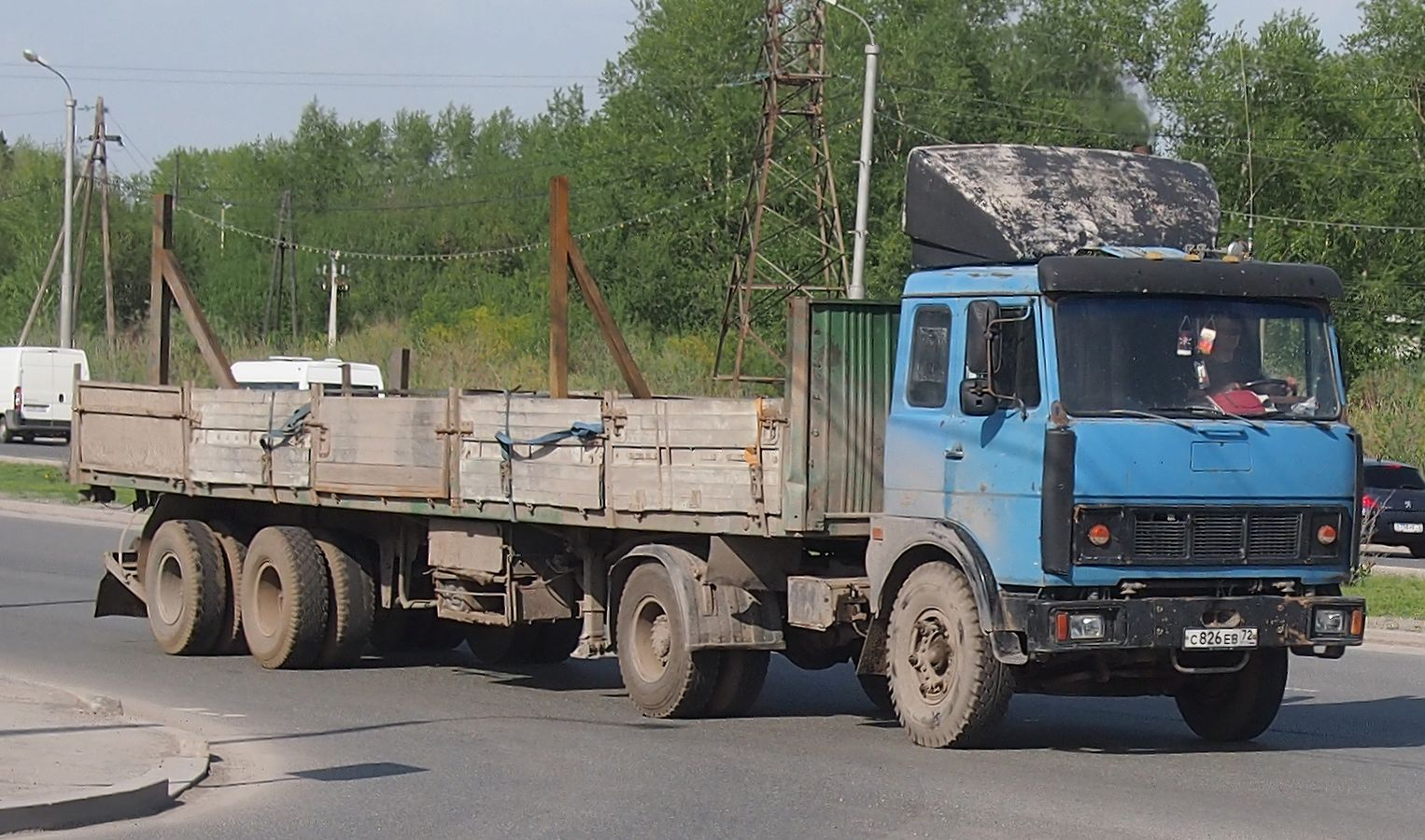 МАЗ-54323 в Тюмени